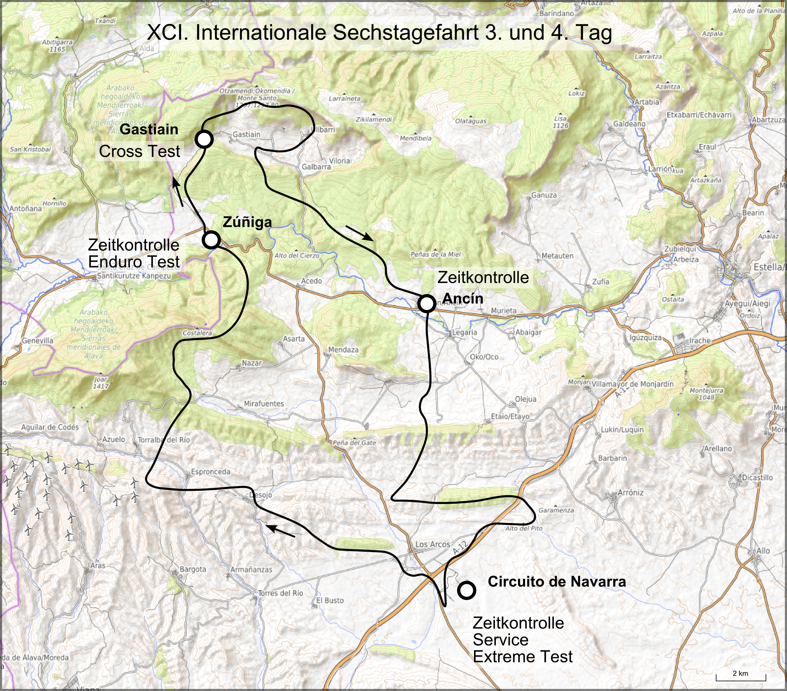 Karte der 91. Internationale Sechstagefahrt, Route der Tage 3 und 4